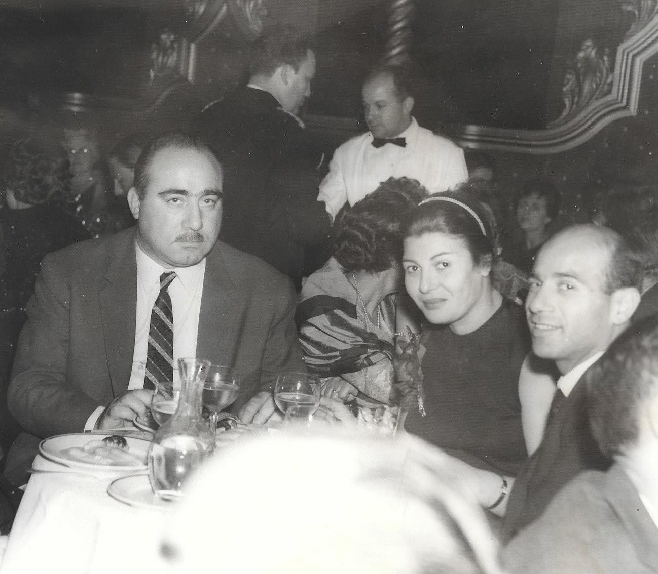 מארח נכבד מצרי בקברט לידו פאריז.